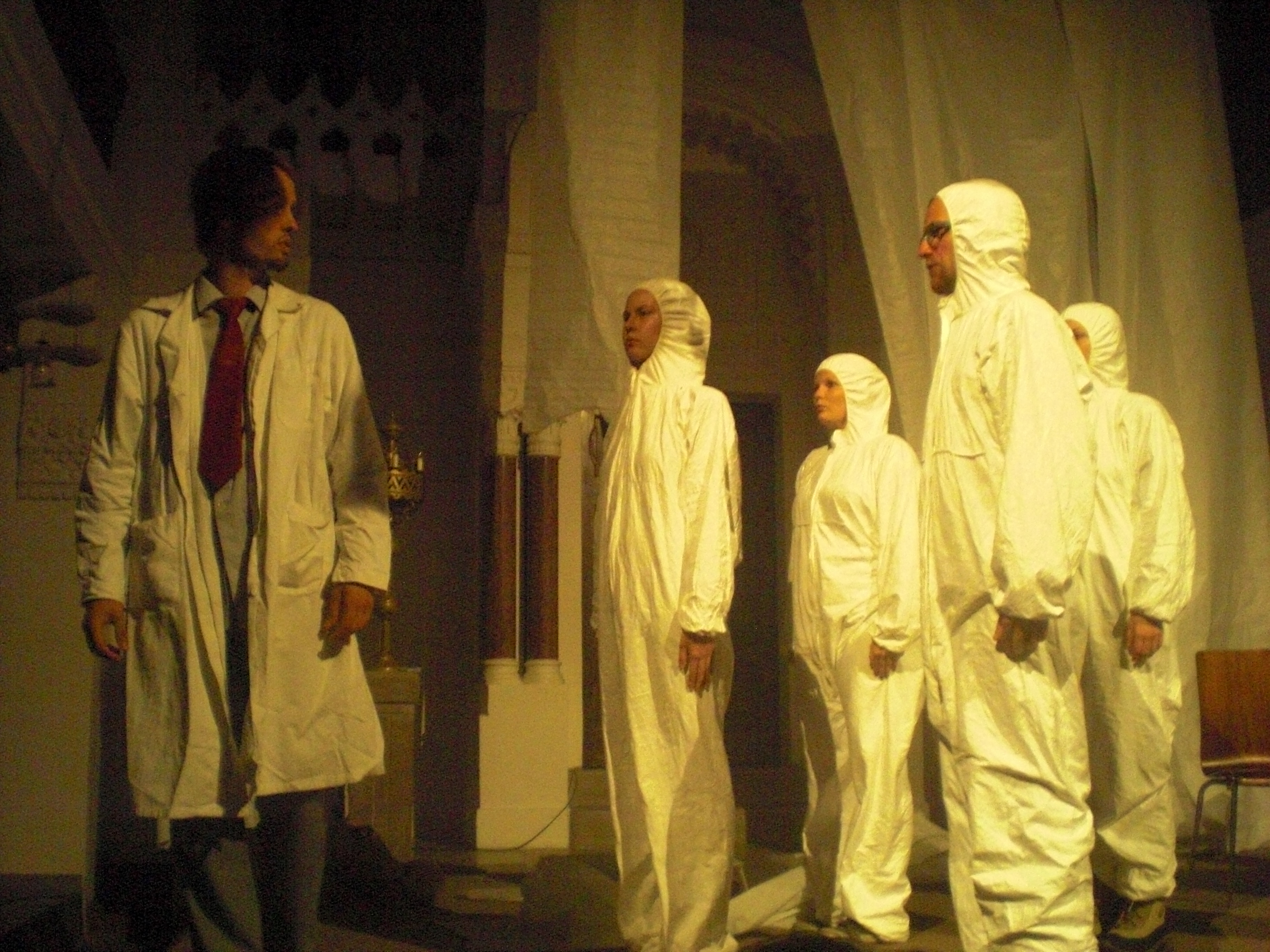 Teatraĵo R.U.R. de Karel Ĉapek en la sinagogo de Nitra